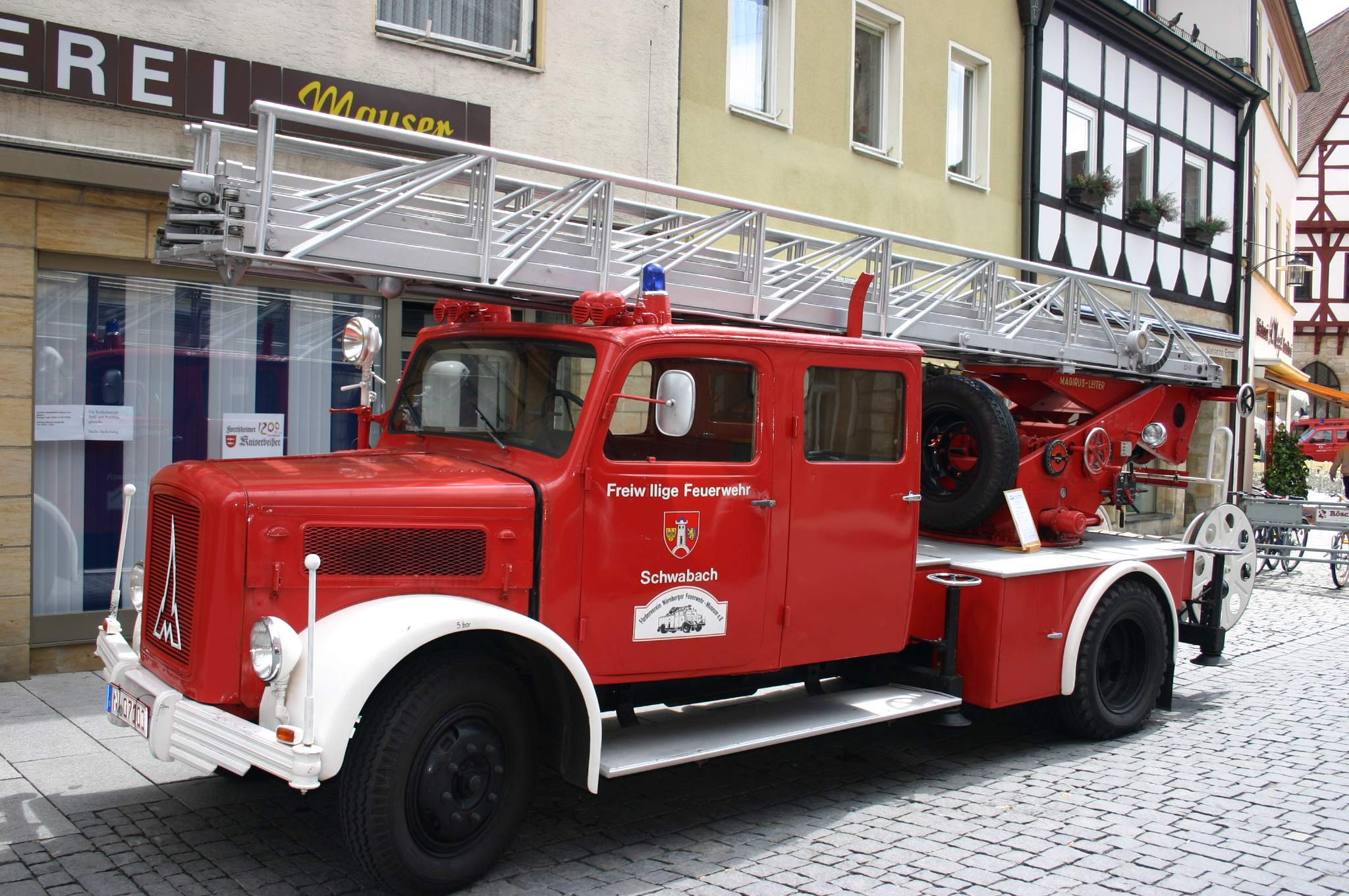 Drehleiter DL 22 (ehemals FFW Schwabach)